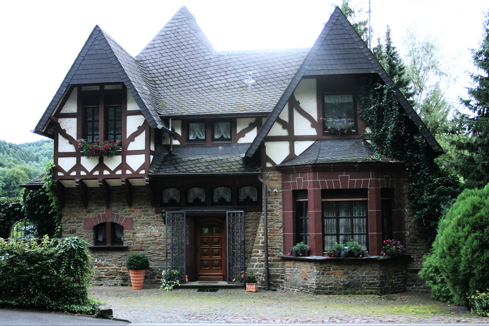 Bahnhof Bröl, Im Bröltal 128, Hennef (Sieg)